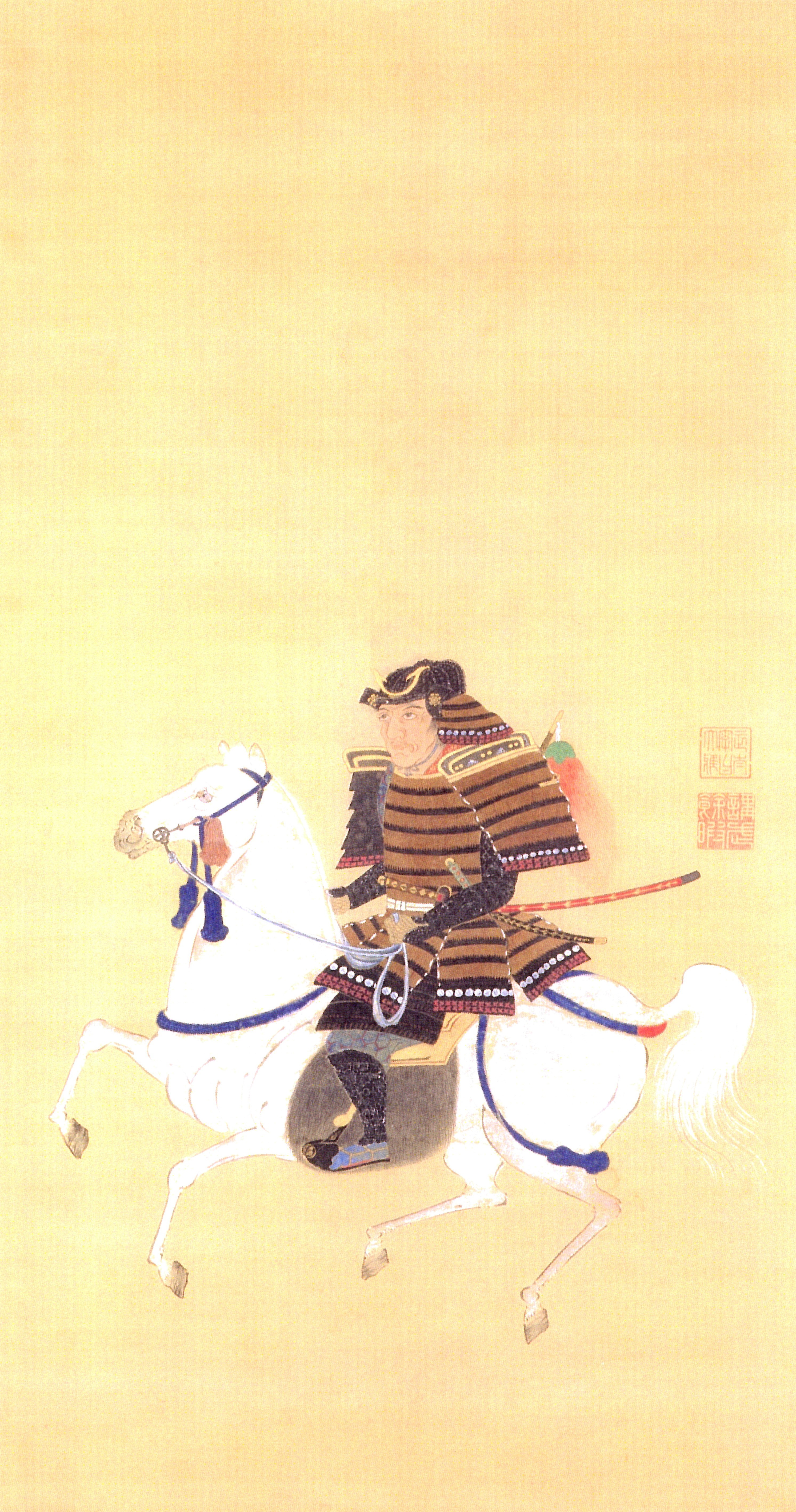 成瀬正幸の肖像。